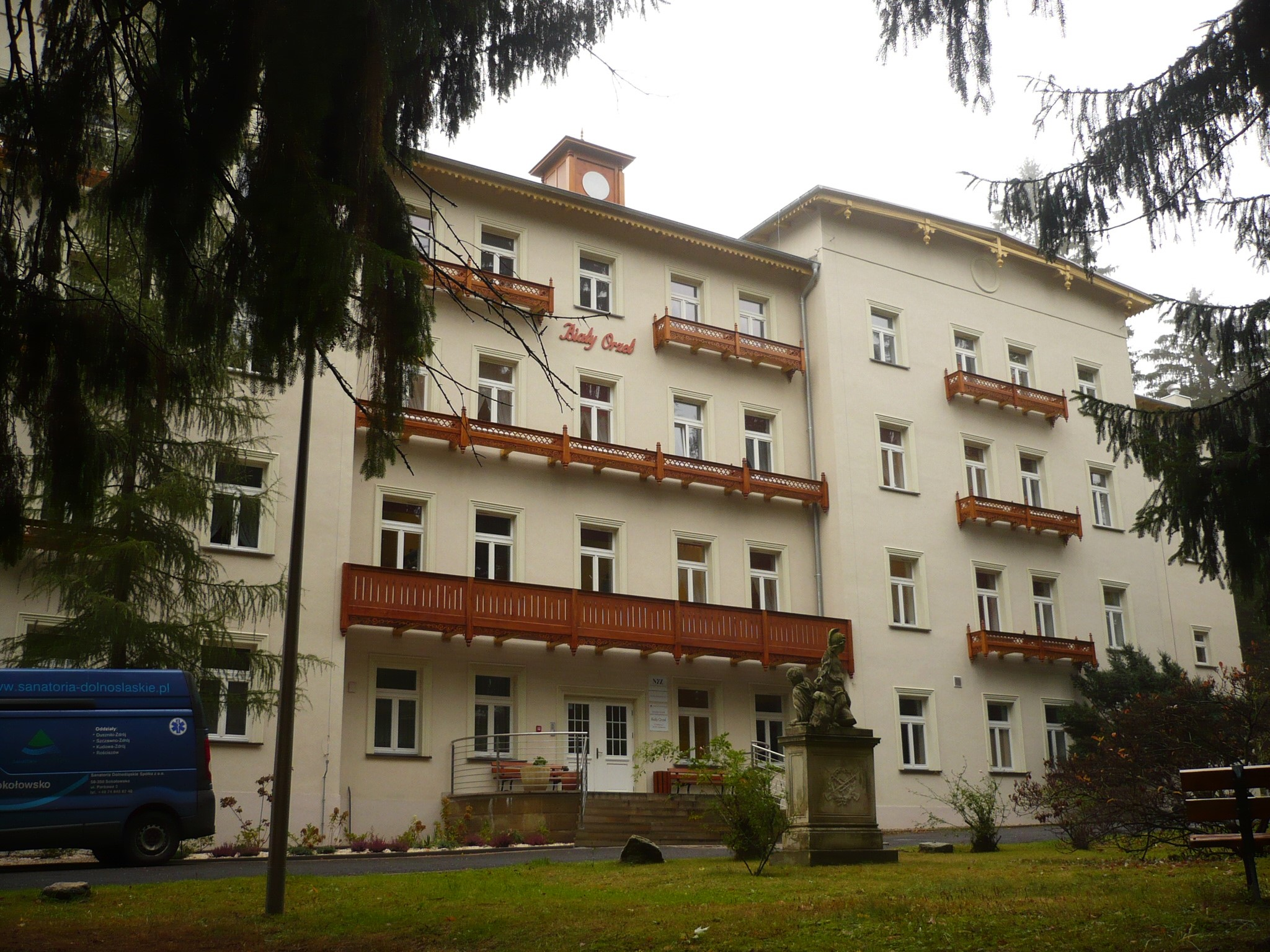 Sokołowsko Park Zdrojowy, ul. Parkowa - budynek główny w zespole dawnego sanatorium dr. T. Römplera, obecnie sanatorium "Biały Orzeł", 1876